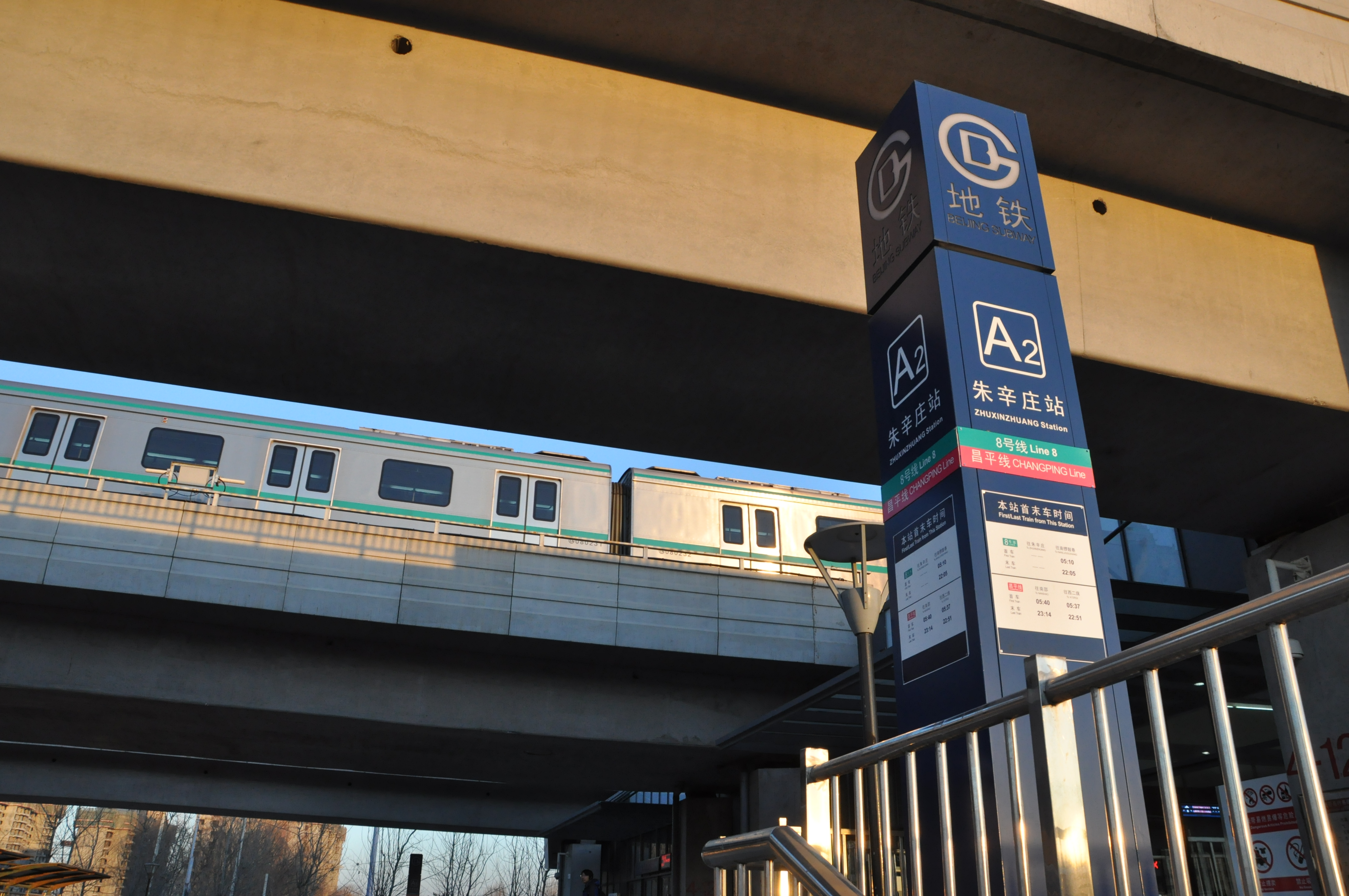 北京地铁朱辛庄站A2出口的地徽（灯柱）与后方高架桥上的列车。